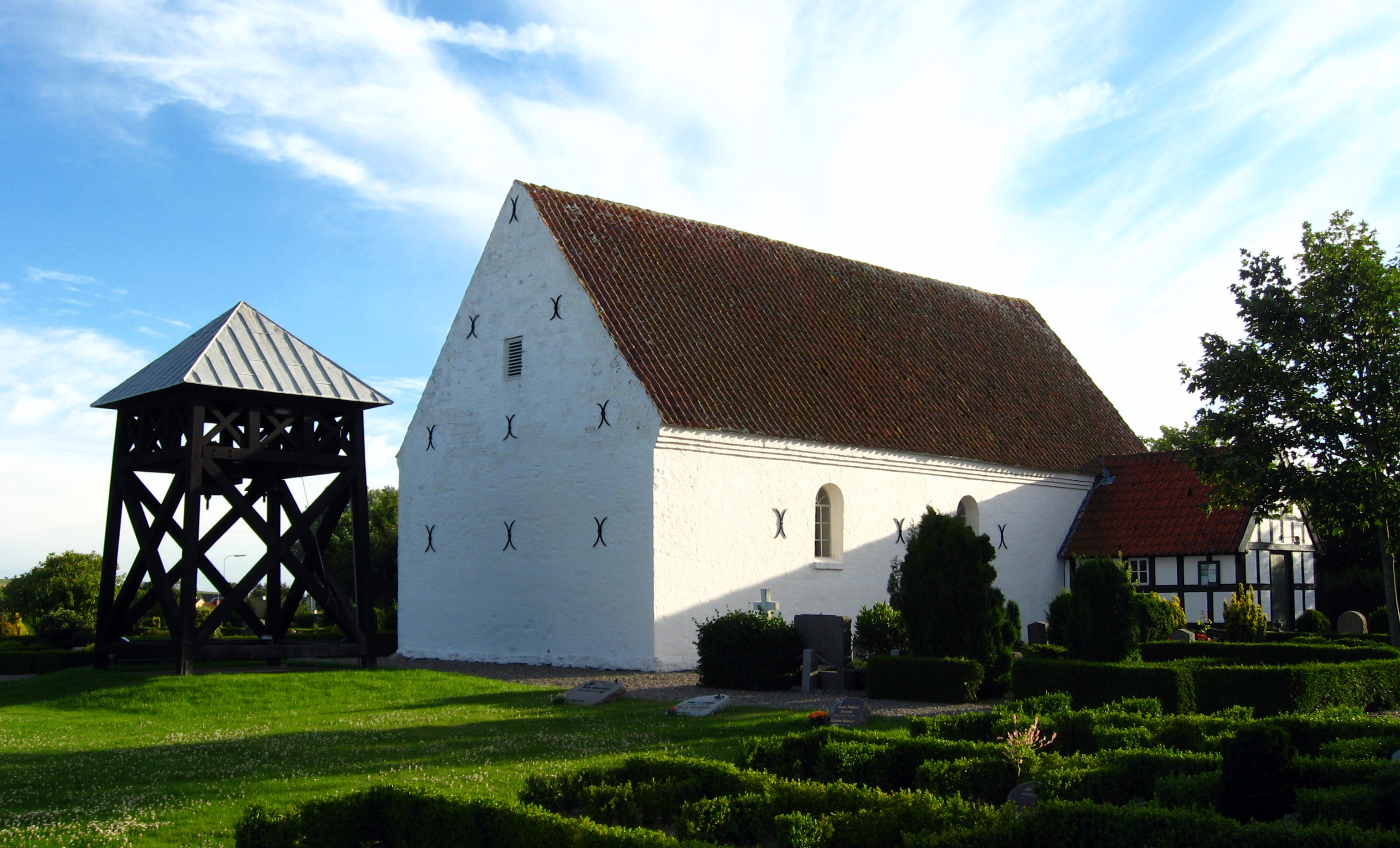 Asdal Kirke, Hjørring Kommune